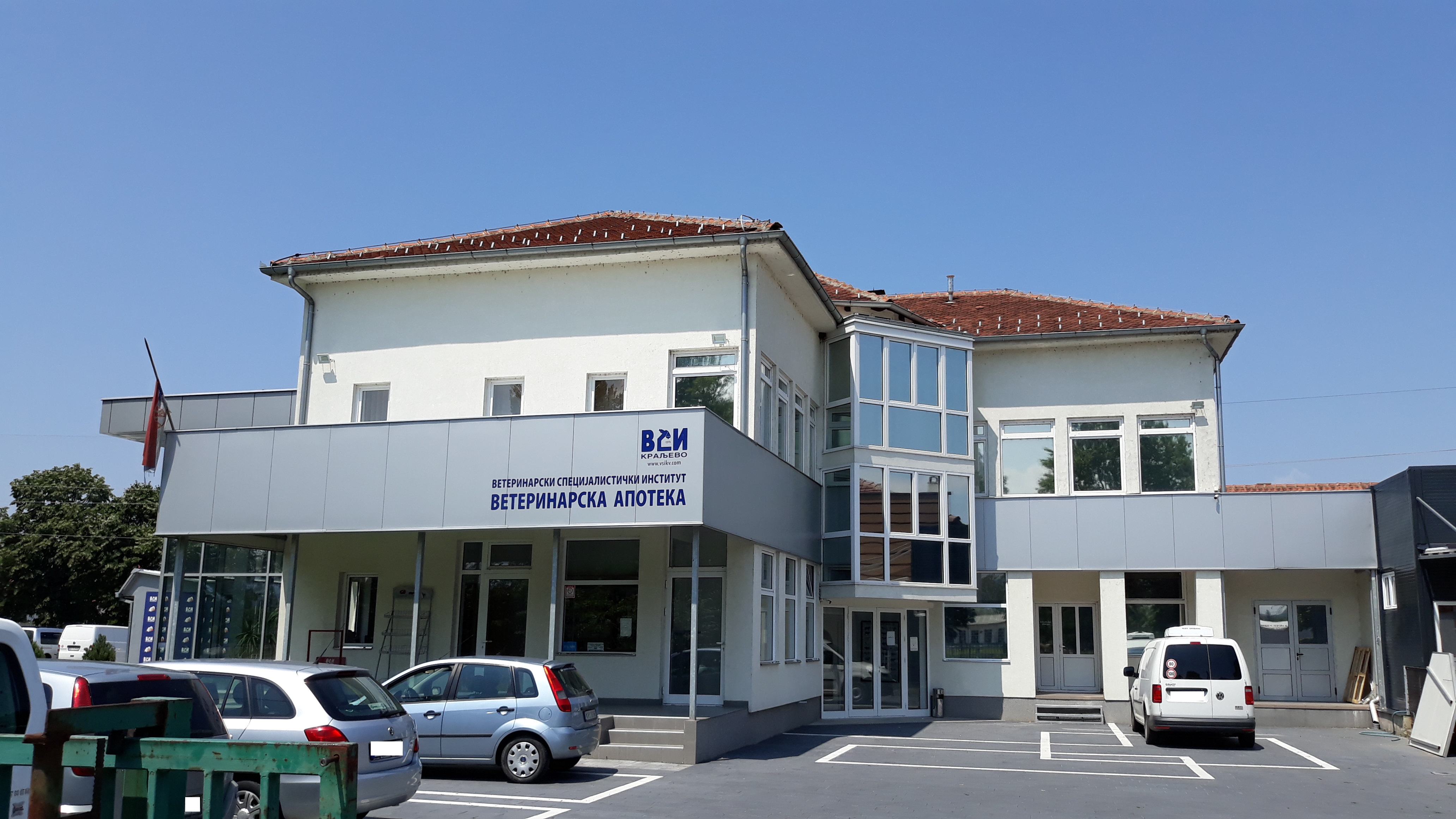 Ветеринарско специјалистички институт Краљево